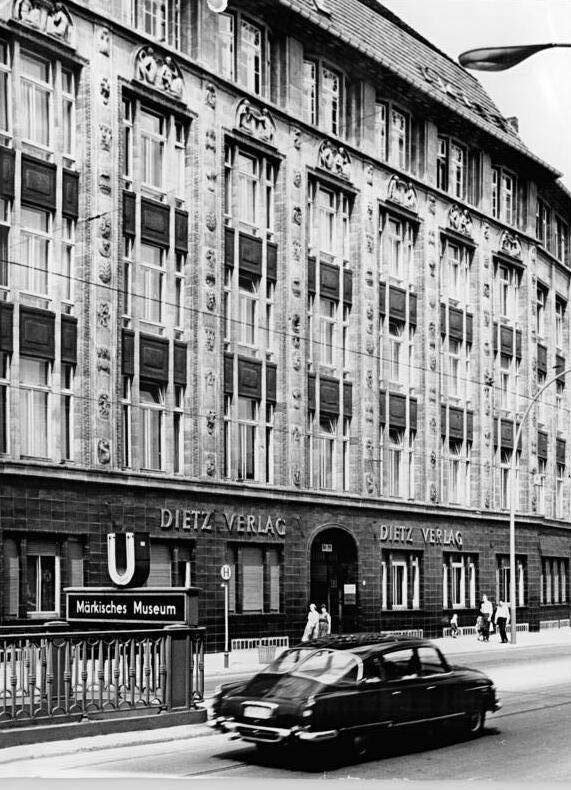 Berlin, Wallstraße, Verlagsgebäude, Dietz-Verlag Zentralbild Spremberg 30.6.1965 20 Jahre Dietz-Verlag. Der Dietz-Verlag Berlin, Träger des Marx-Ordens, in der Berliner Wallstraße (unser Bild) feiert am 30. Juli 1965 sein 20-jähriges Bestehen. Der Verlag brachte in dieser Zeit 4100 Titel mit insgesamt 168 Millionen Exemplaren heraus, die für Millionen Menschen Grundlage des Studiums des schöpferischen Marxismus-Leninismus waren und sind zugleich Quelle eines tiefen Verständnisses der Politik der Partei der Arbeiterklasse, der SED